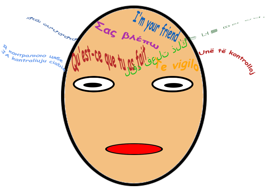 Imagen representativa de la alucinación acústica